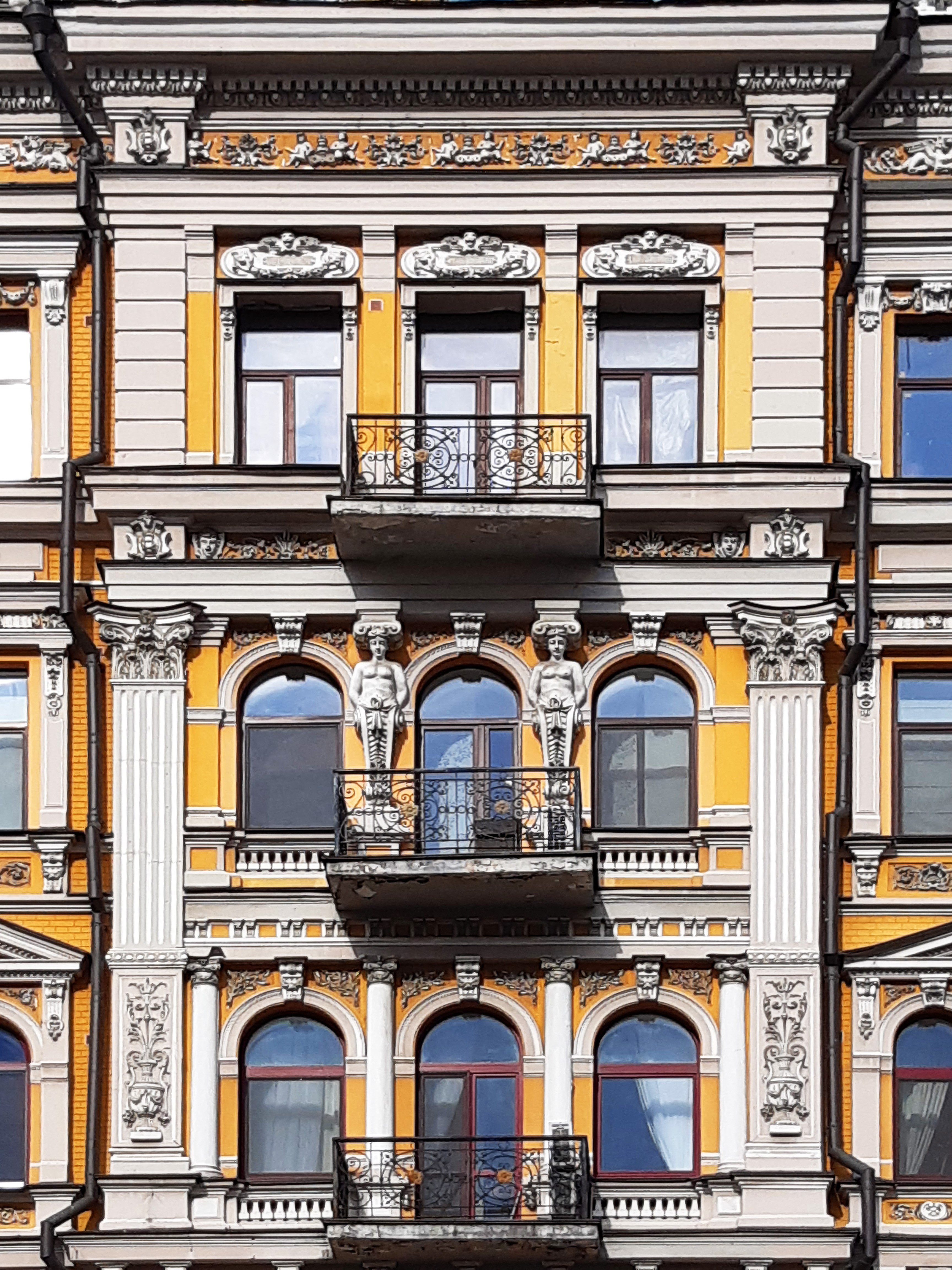 Жилий будинок, Київ, вул. Б. Хмельницького, 30/10